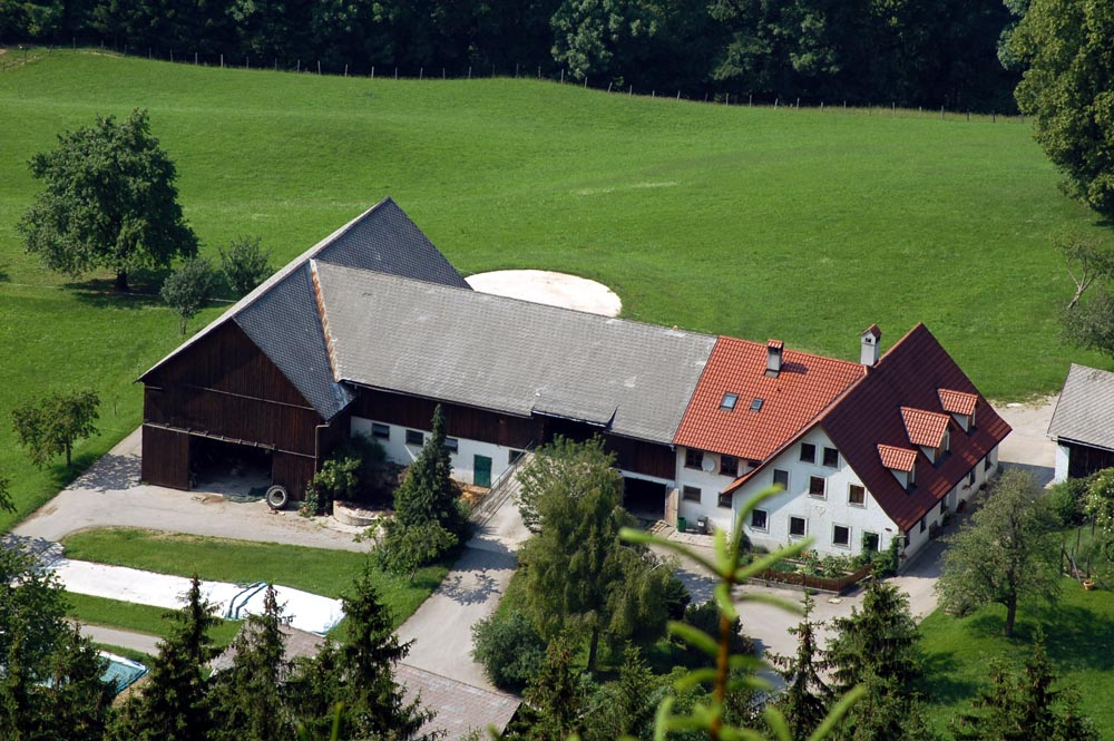 Typische Hofform, hier im Alpenvorland in Ybbsitz in Niederösterreich.